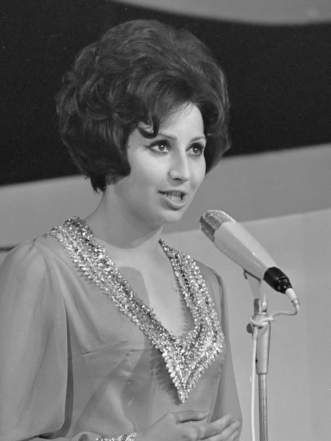 Singing Europe 1969, de finale in Scheveningen. Presentatrice Helga Vlahovic 9 juli 1969